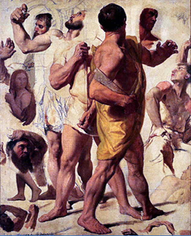 Etudes pour le Martyre de saint Symphorien